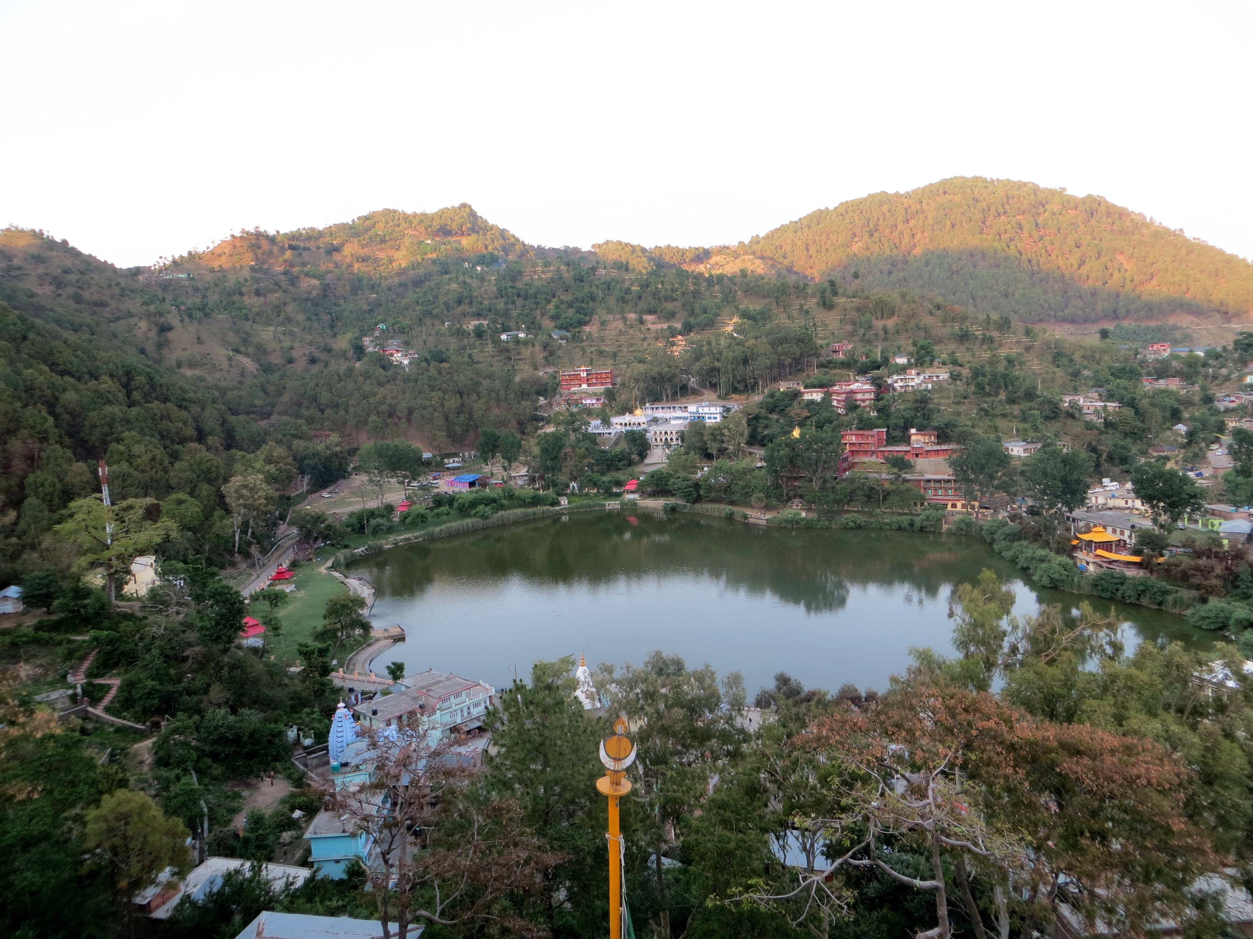 Ревалсар — город в округе Манди в индийском штате Химачал-Прадеш. Вид сверху от статуи Будды.